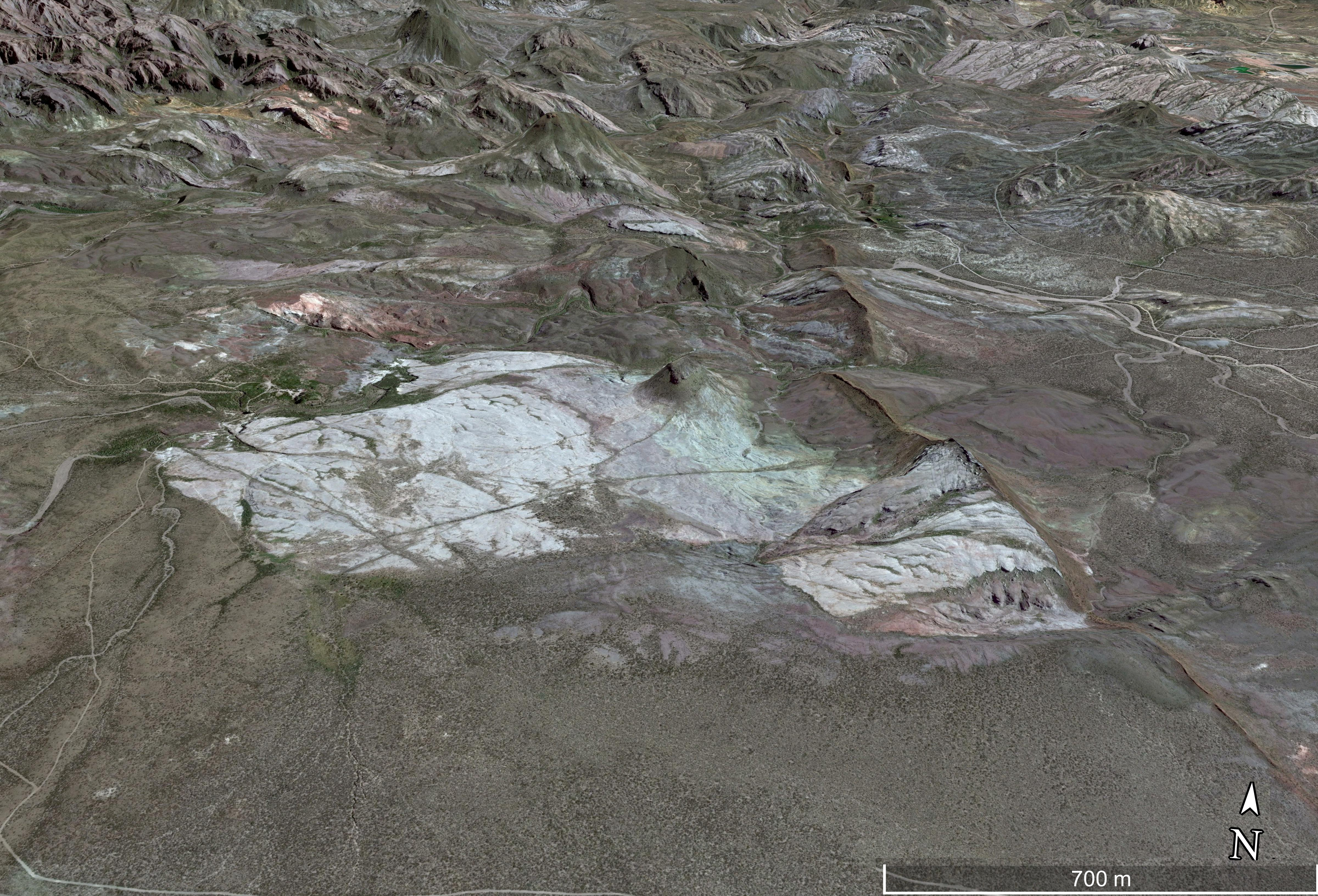 En color gris se observa un afloramiento de la Formación el Imperial, ubicado al norte del Río Atuel en el centro de la provincia de Mendoza.